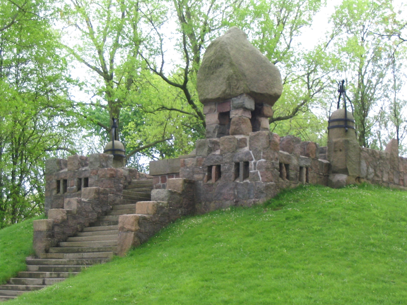 Dusendüwelfswarf